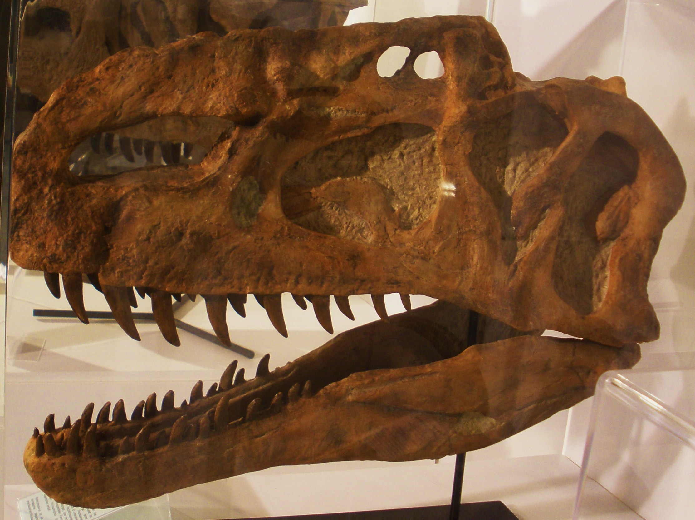 fossil Monolophosaurus